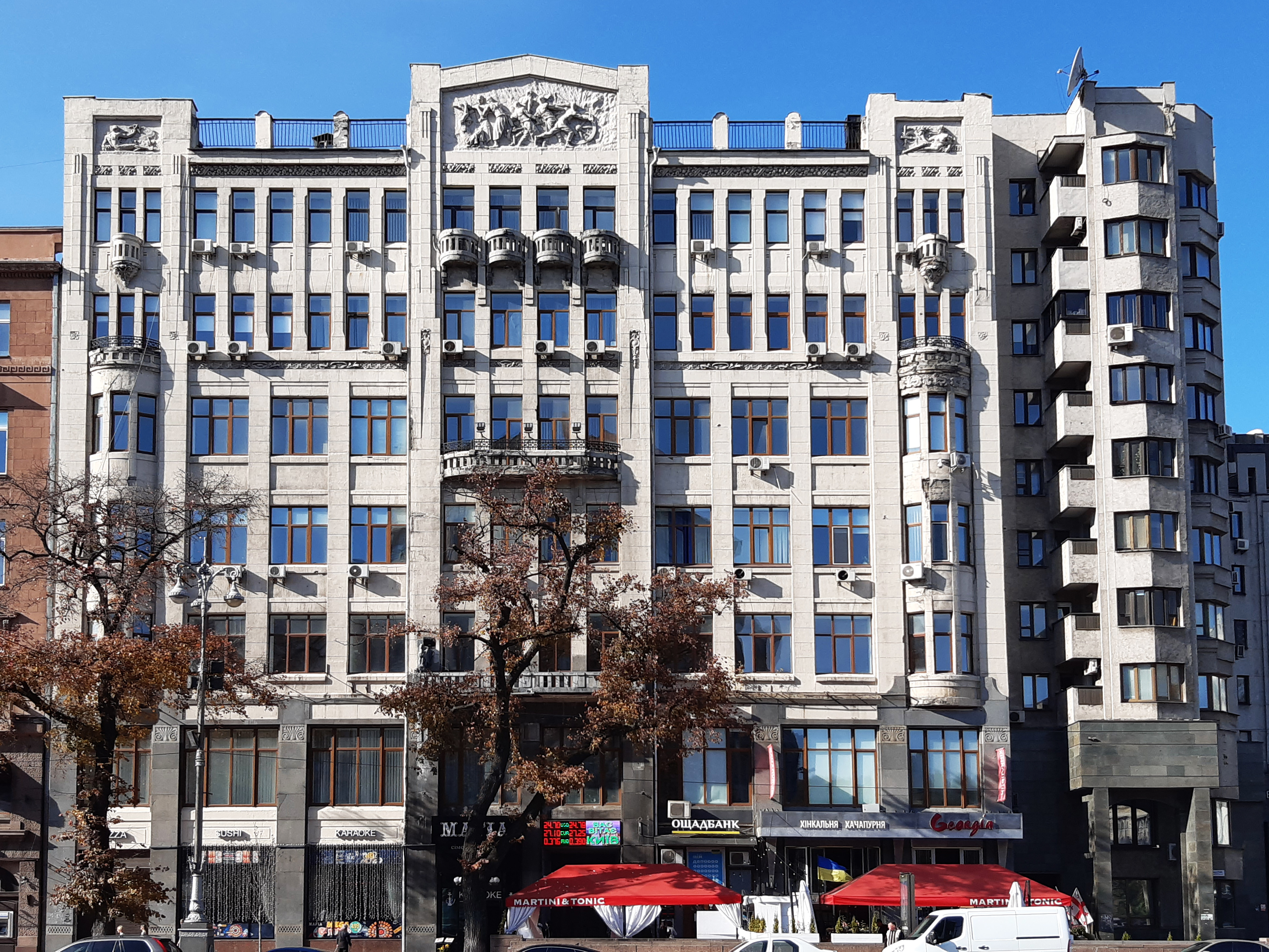 Будинок конторський і торговий, Київ, вул. Хрещатик, 6